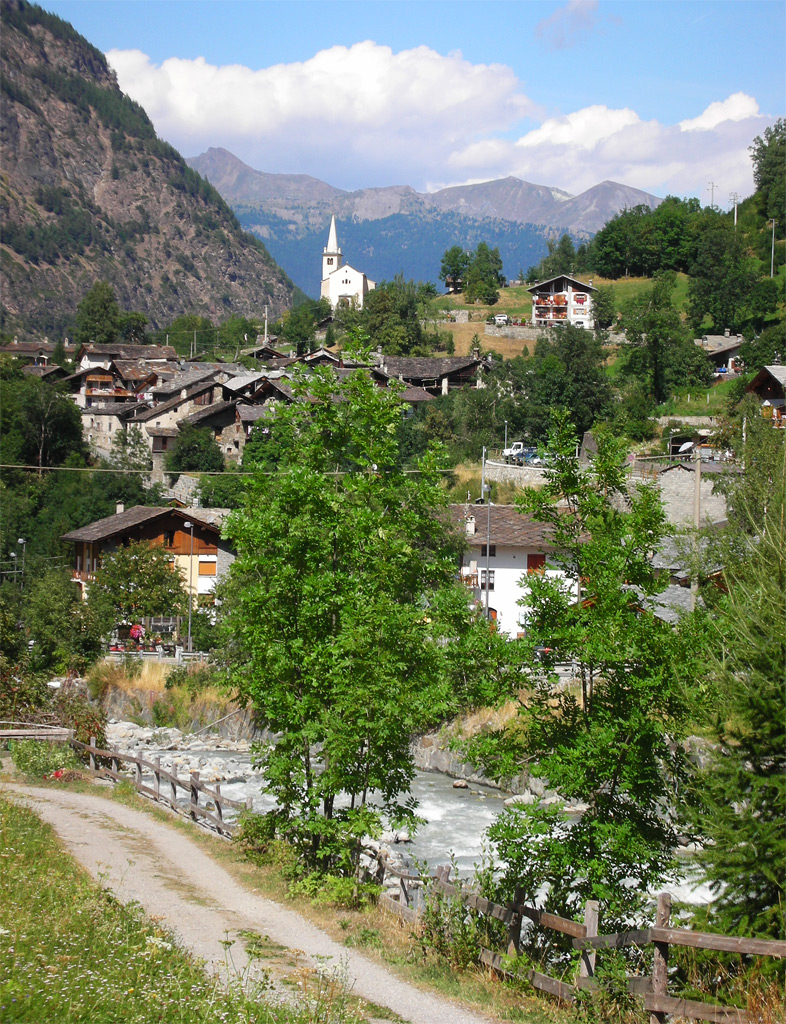 Rhemes Saint Georges